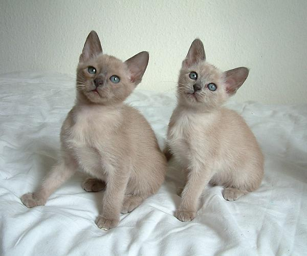 Chatons tonkinois blue mink (chatterie de l'Esprit d'Edenvane)